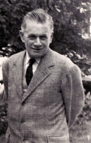 Mario Sironi